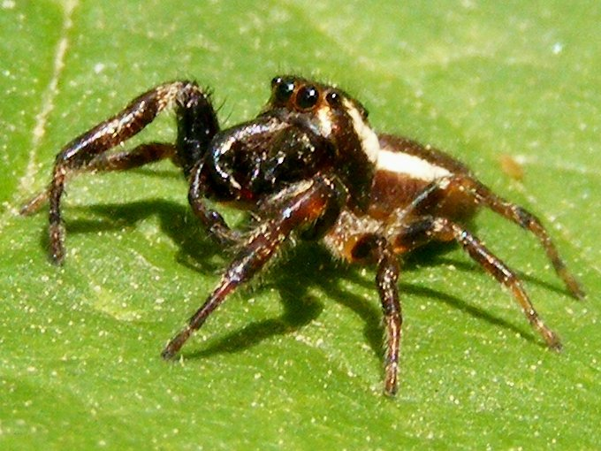 Pelegrina exigua : Photographié dans la région montréalaise le 6 juin 2011, sur Fujifilm FinePix S700.